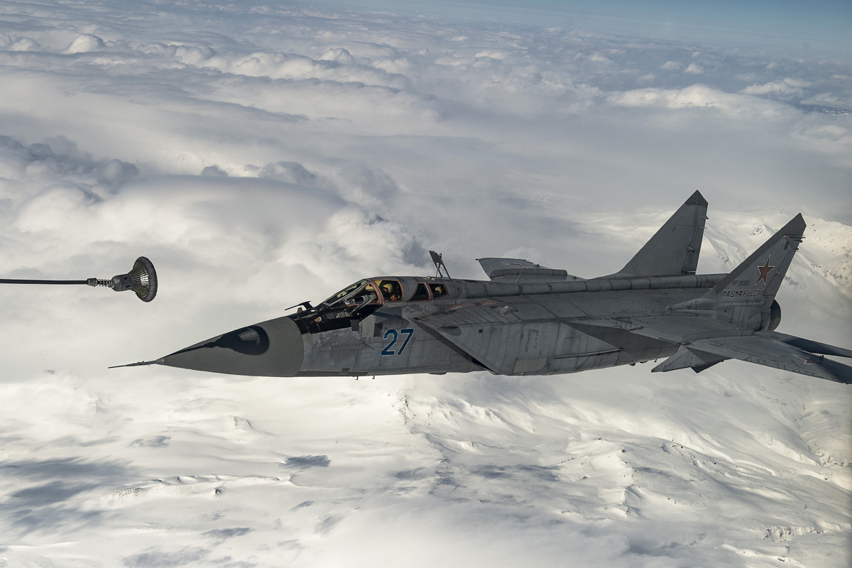 На Камчатке истребители МиГ-31 ТОФ отработали перехват крылатой ракеты условного противника.